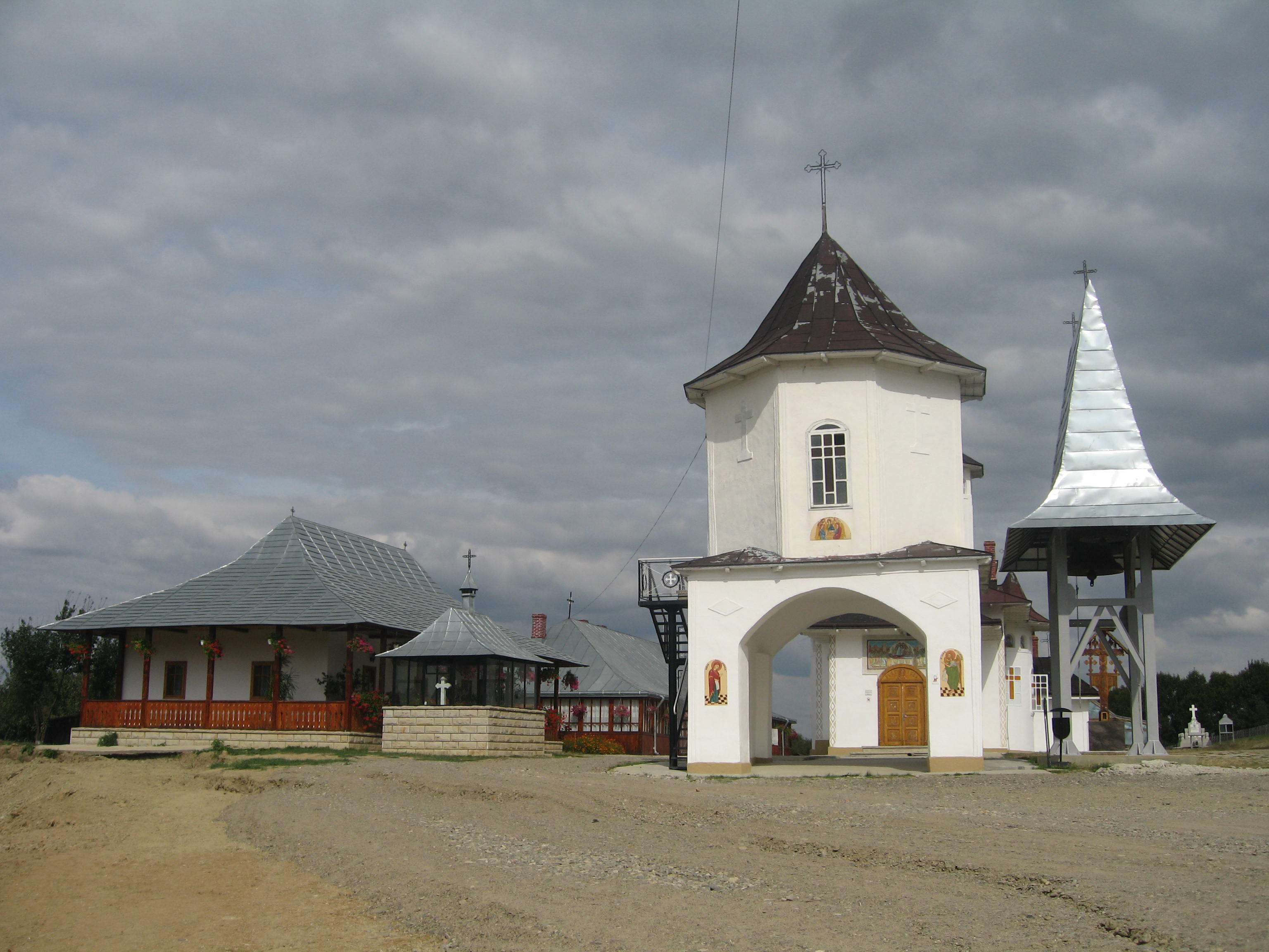 Mănăstirea Zosin 02